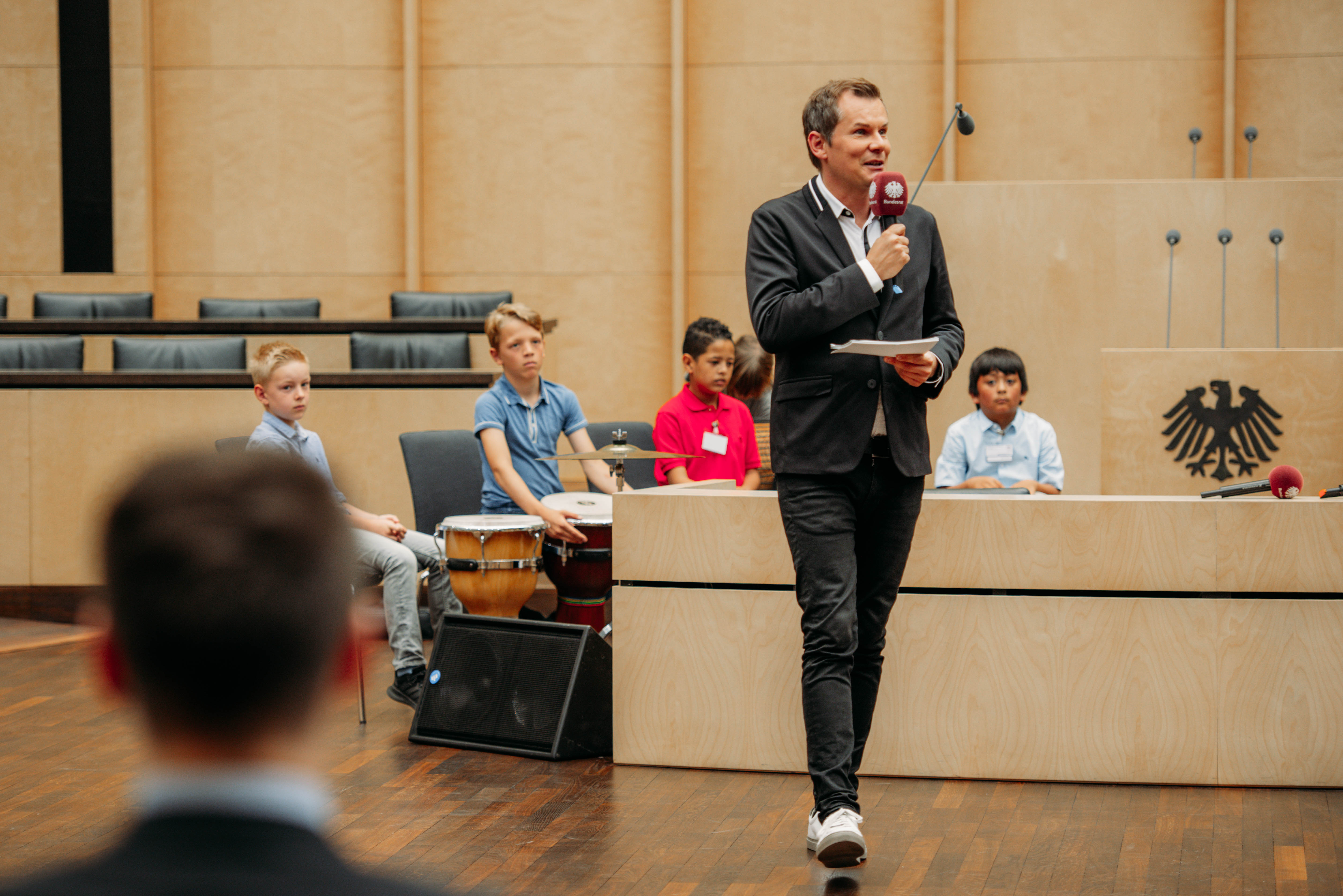 Am Donnerstag, den 20. Juni 2019, fand die feierliche Preisverleihung des Schülerzeitungswettbewerbs der Länder 2019 im Bundesrat in Berlin statt. Bundesratspräsident Daniel Günther, Schirmherr des Wettbewerbs, Caren Marks, Parlamentarische Staatssekretärin bei der Bundesministerin für Familie, Senioren, Frauen und Jugend, sowie Vertreterinnen und Vertreter der Sonderpreispartner und namenhafter Medien zeichneten insgesamt 31 Redaktionen aus. Moderiert wurde die Preisverleihung von Malte Arkona (im Bild). (Originaltext von Flickr.)